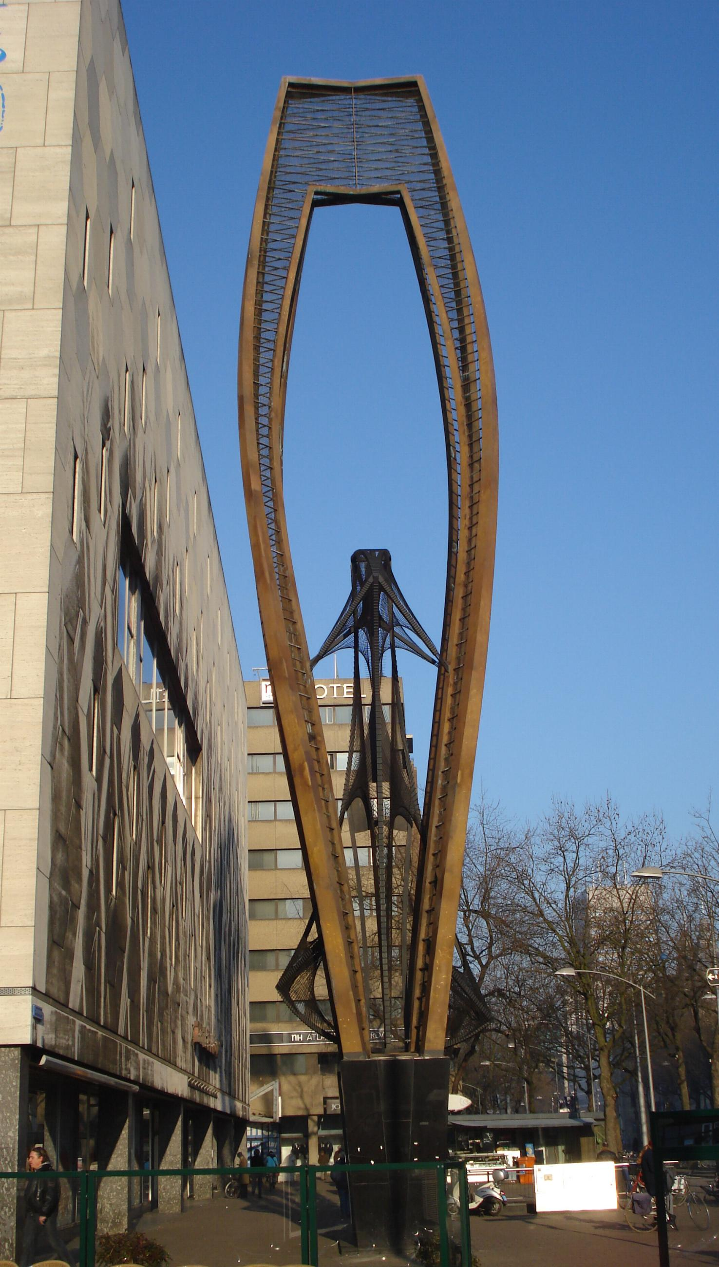 Rotterdam, Coolsingel. Kunstwerk zonder titel ("Gestileerde bloem") van Naum Gabo. Rotterdam/The Netherlands.